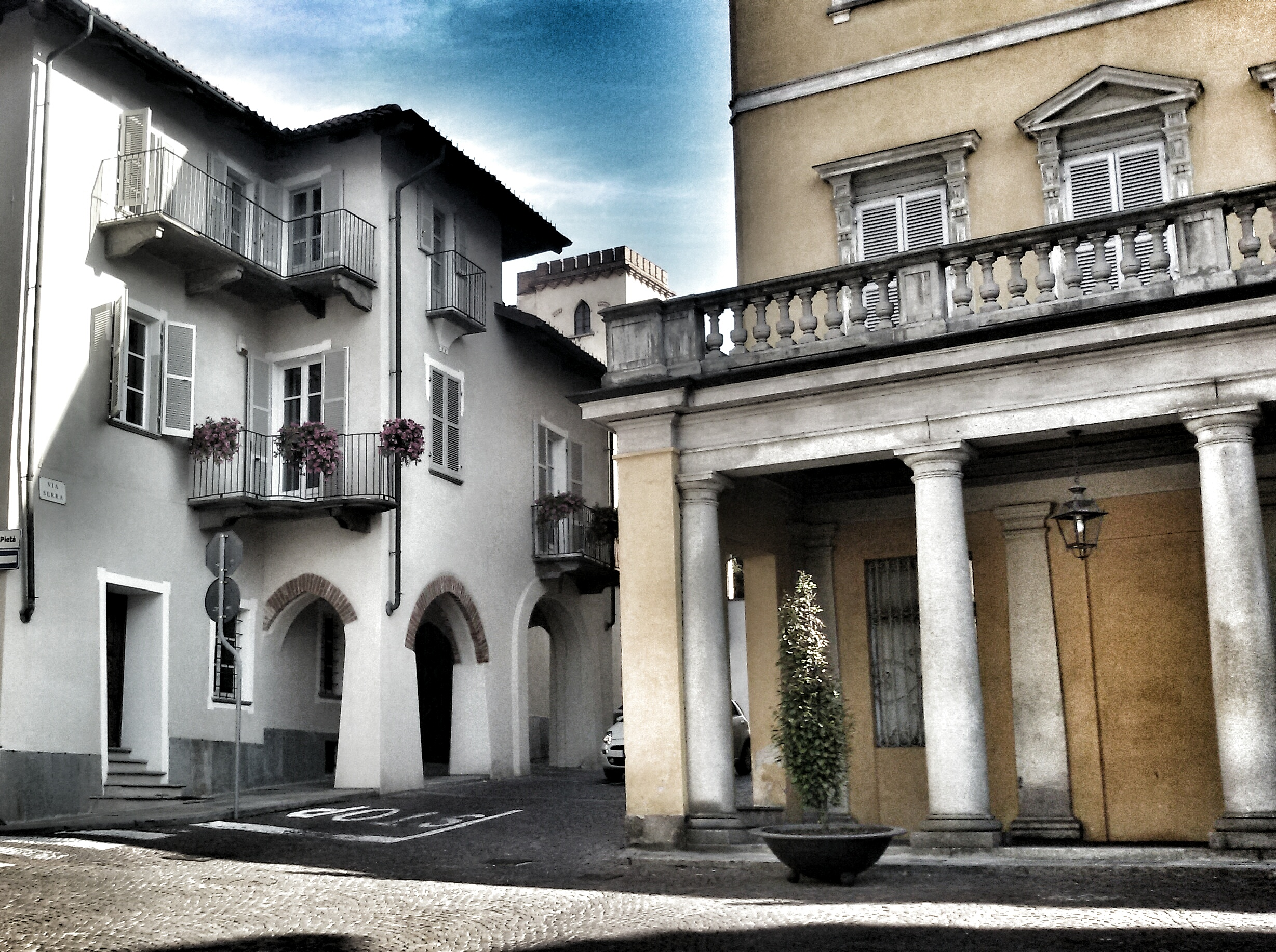 Palazzo Garrone This is a photo of a monument which is part of cultural heritage of Italy.